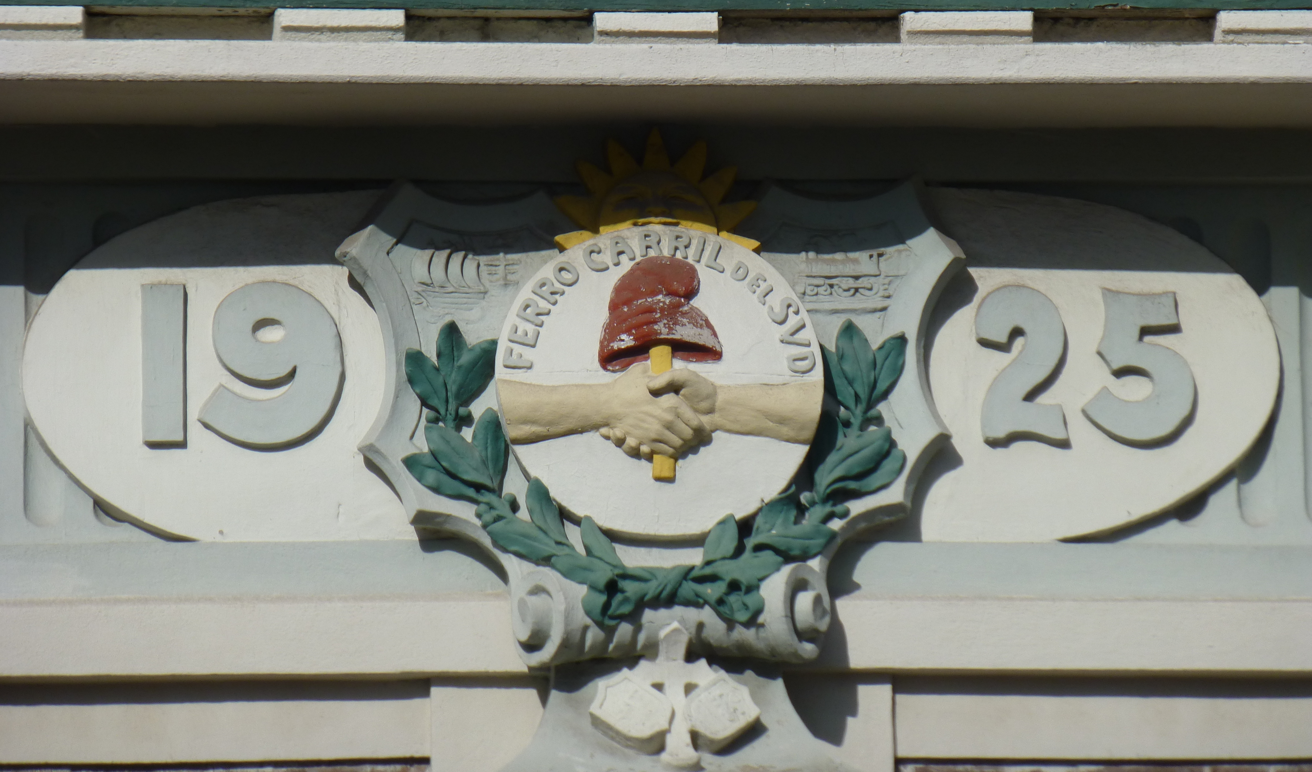 Insignia del Ferrocarril del Sud en la Estación Banfield, Buenos Aires.